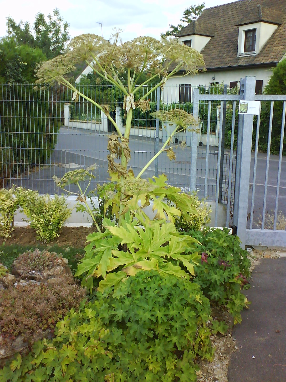 HeracleumGiganteum